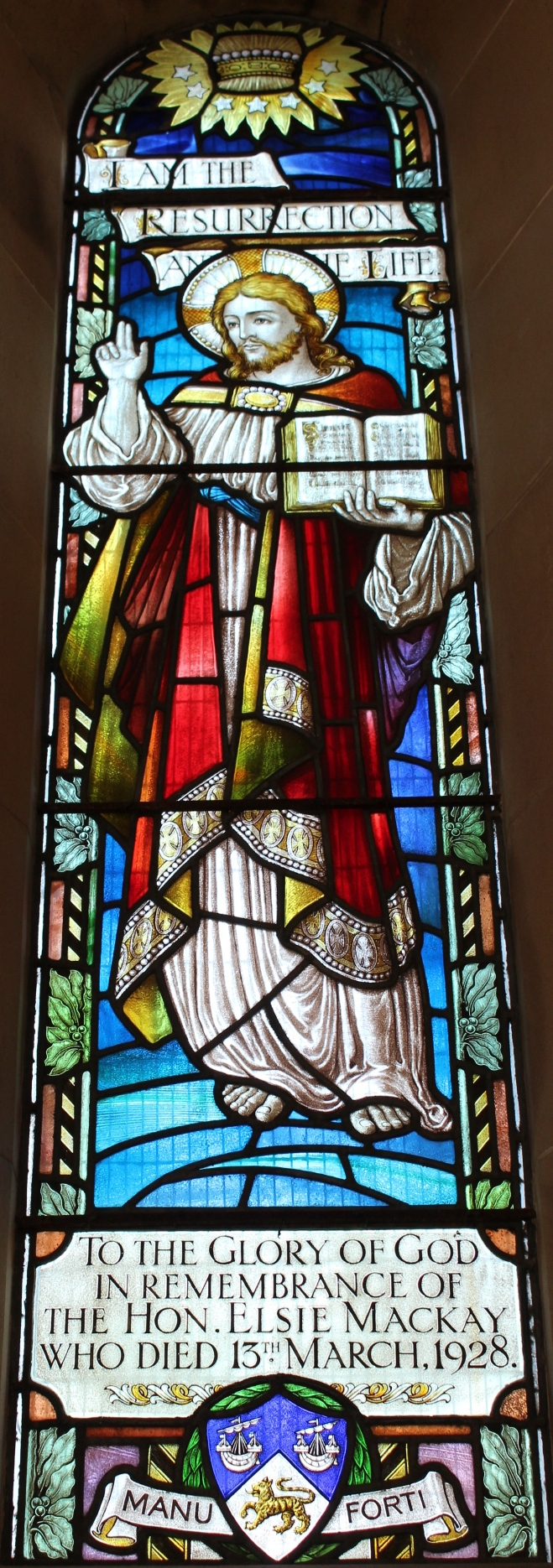 Glasfenster zur Erinnerung an die Luftfahrtpionierin Elsie Mackay (1893-1928) in Glenapp Church